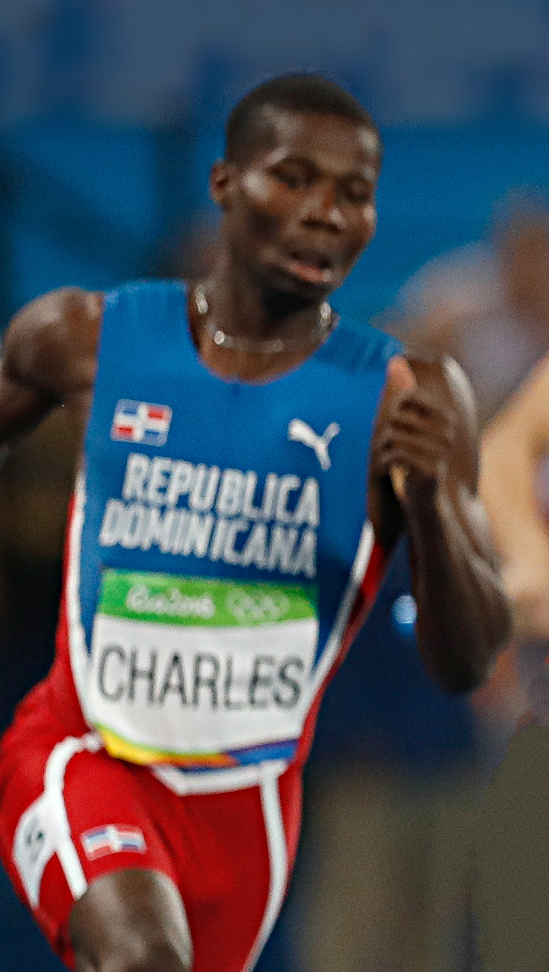 Rio de Janeiro - Eliminatórias do revezamento 4 x 400m nos Jogos Rio 2016, no Estádio Olímpico (Fernando Frazão/Agência Brasil)